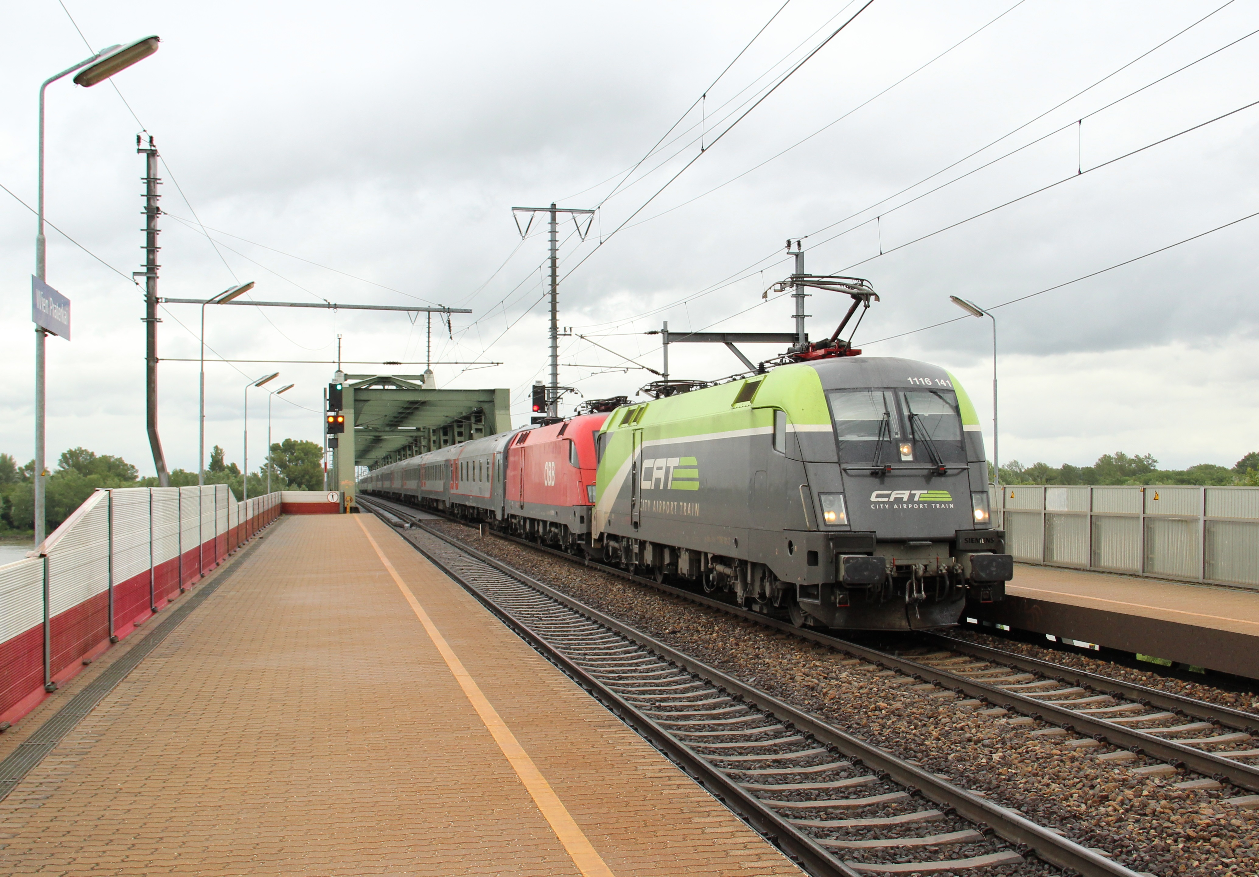 Die CAT-Lok 1116.141 fährt im Tandem mit einer roten Taurus mit dem Personenzug von Moskau nach Nizza durch die Haltestelle Wien Praterkai